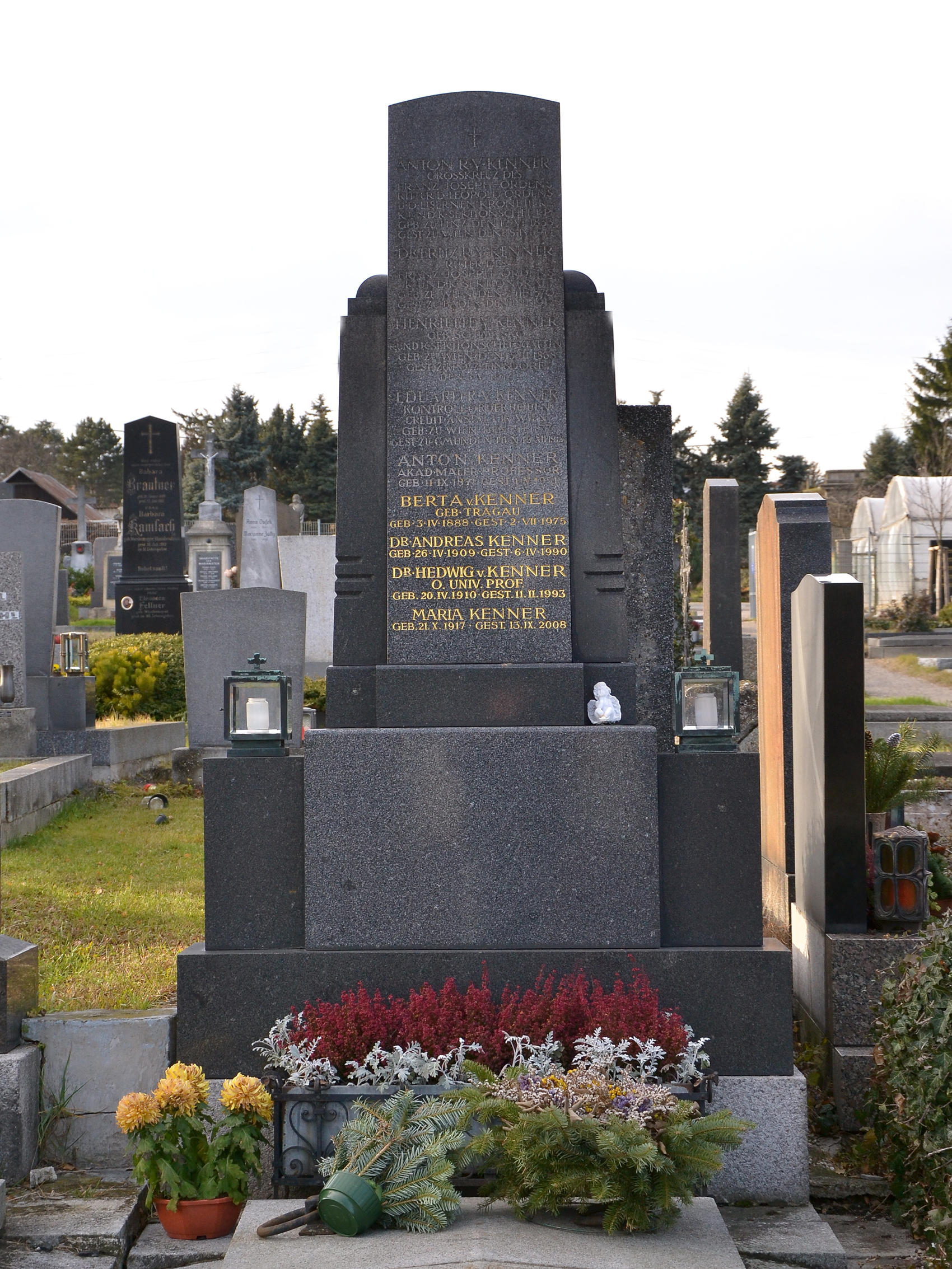 Dr. Hedwig von Kenner, Österreichische Archäologin